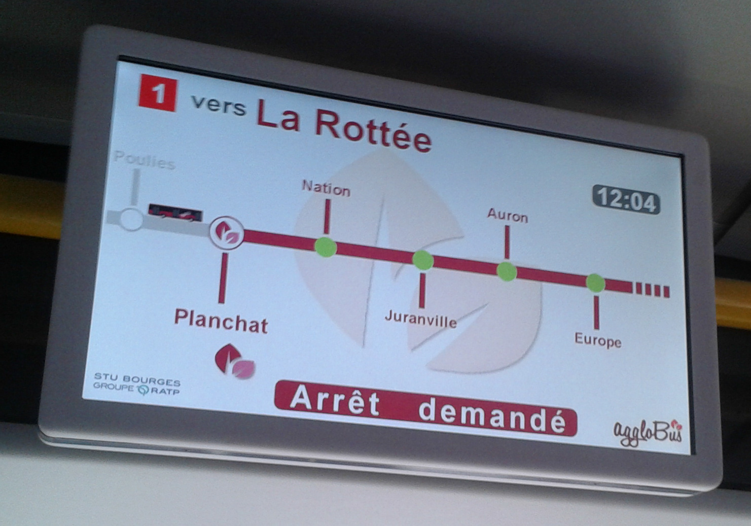 L'évolution des transports en commun de Bourges